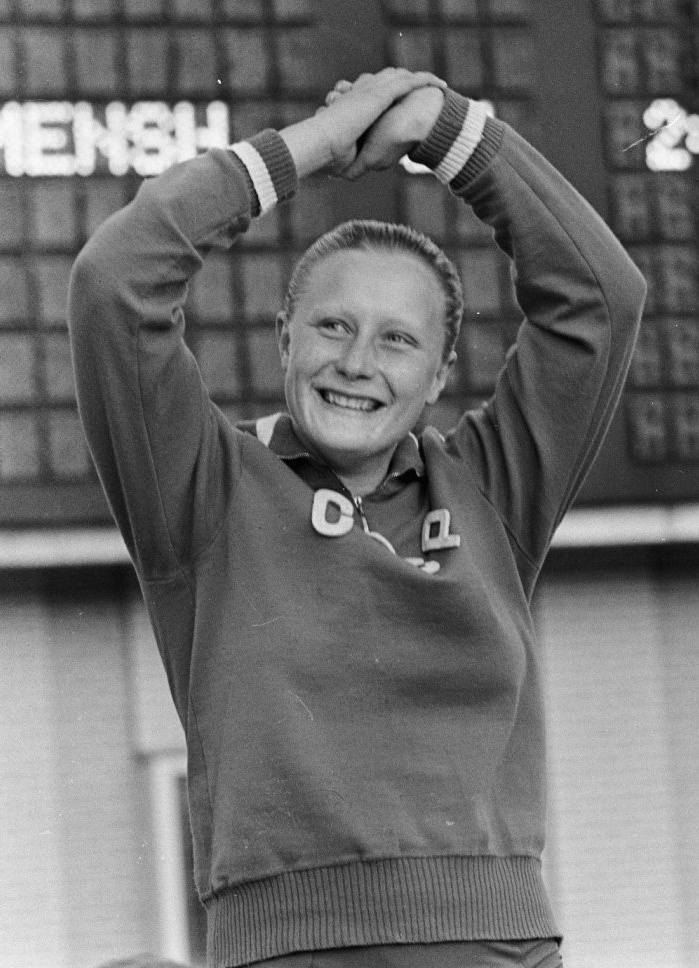 Galina Prozumenshchikova, European championships, podium 200 m breaststroke